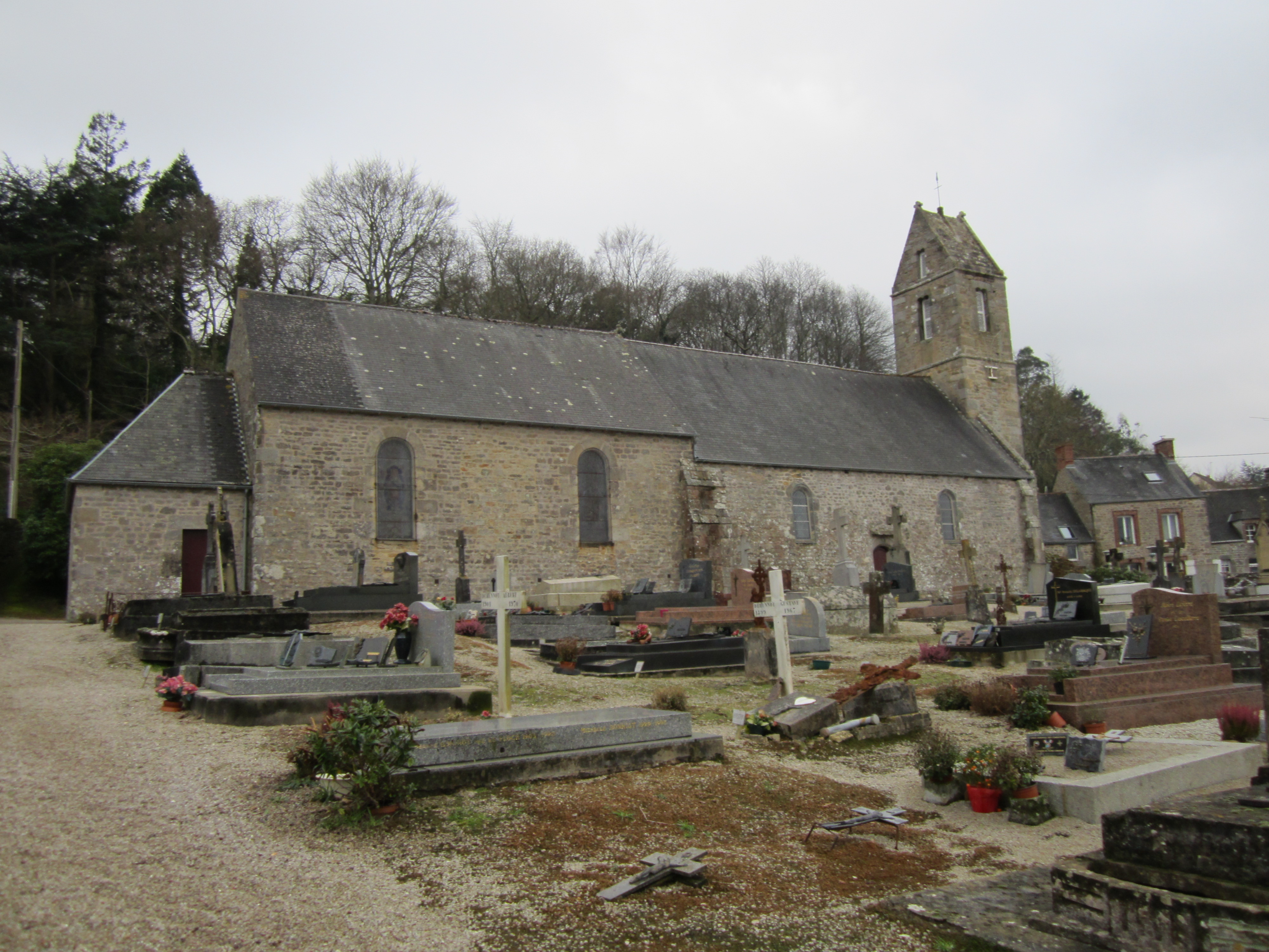 église Sainte-Marie (ou Notre-Dame) du Vicel